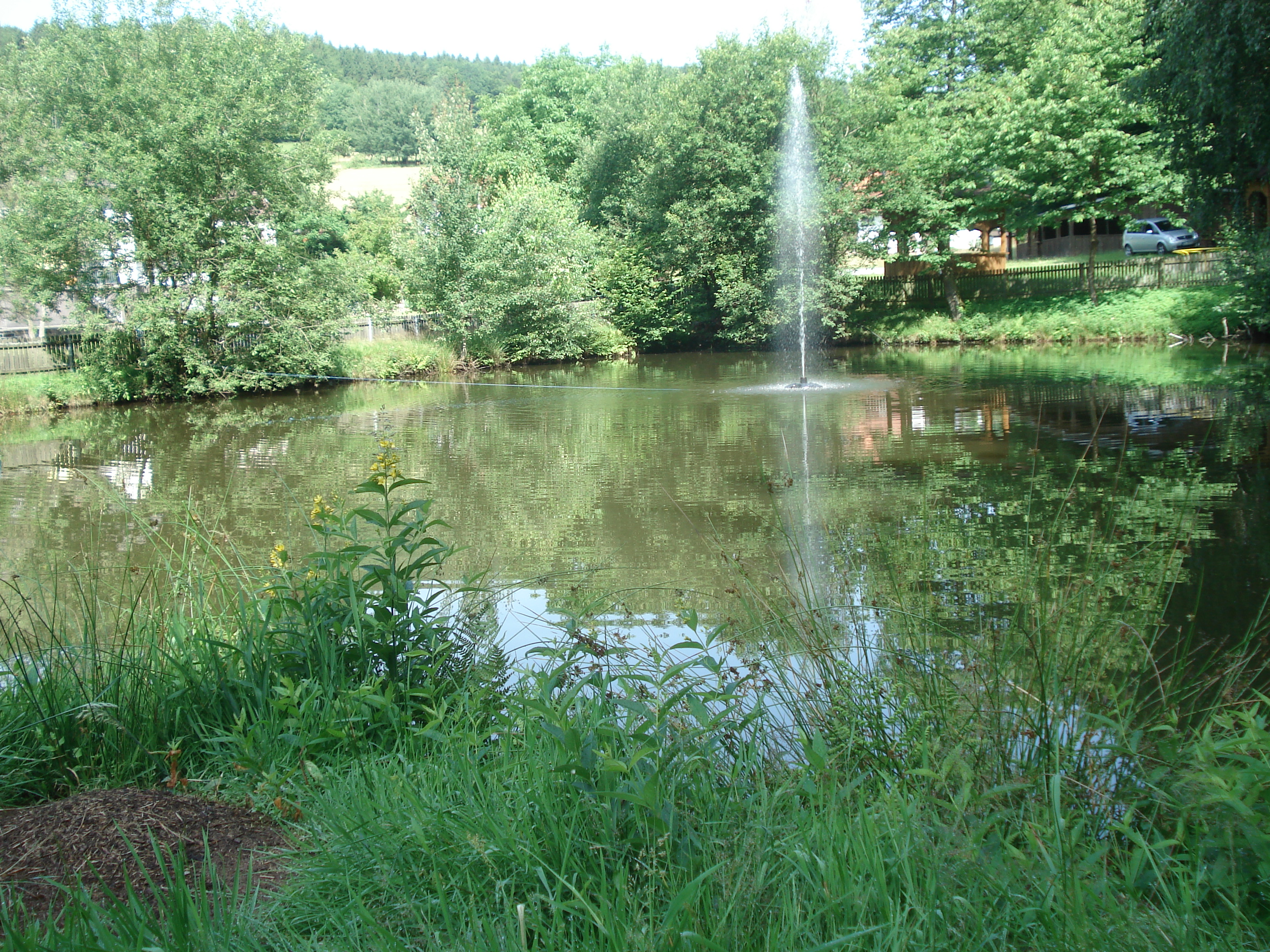 Ein Weiher in Wildensee. Ihm entfließt der Aubach.